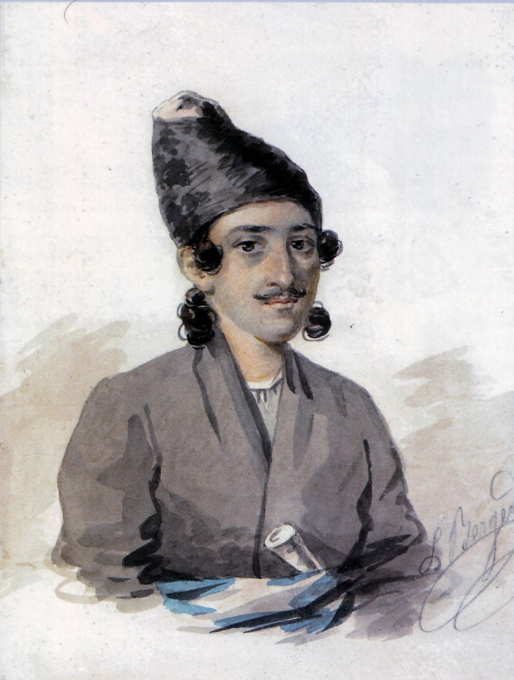 «Портрет Хозрева-Мирзы». 1829 г. Государственный Литературный музей, Москва Художник Ф. Берже. 1829